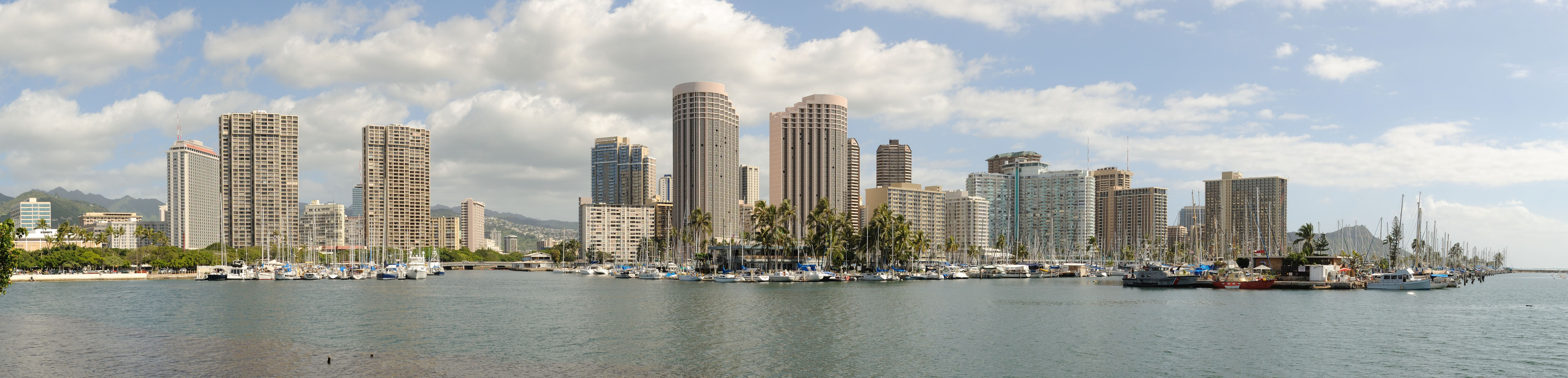 Ala Wai Harbor / Waikiki Panorama